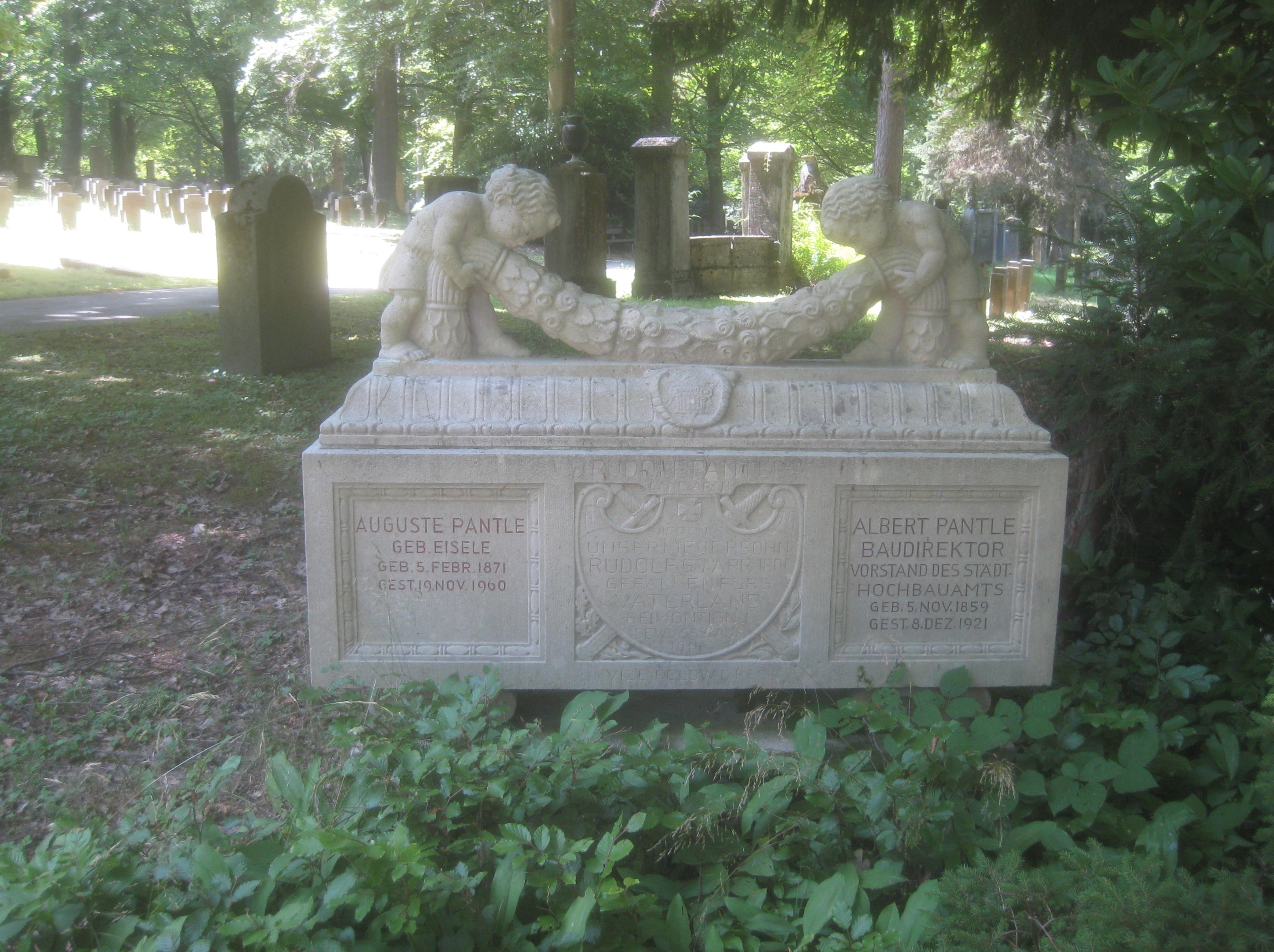 Grab von Albert Pantle, Stuttgart, Waldfriedhof Stuttgart, Abteilung 07.